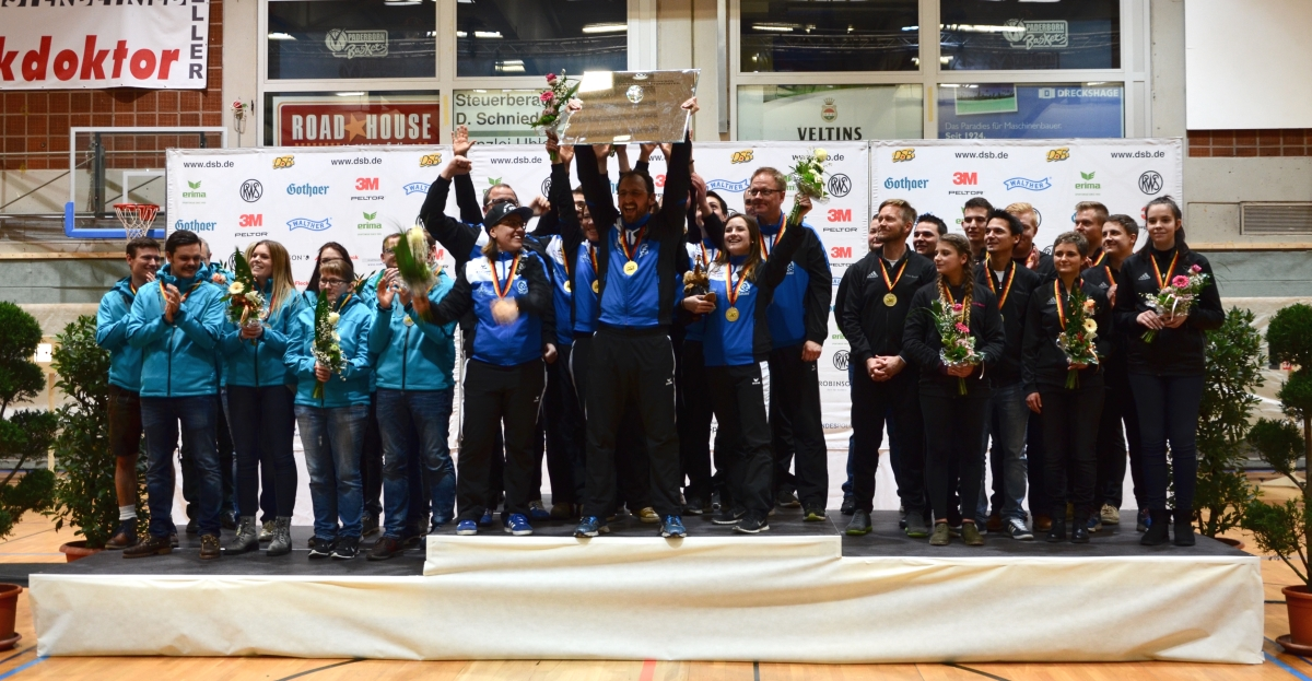 Die SB Freiheit (mitte) ist Deutscher Meister 2017/2018 der 1. Bundesliga Luftgewehr. Eichenlaub Saltendorf (links) gewann die Silbermedaille, Bronze ging im kleinen Finale an den SV Pfeil Vöhringen (rechts).